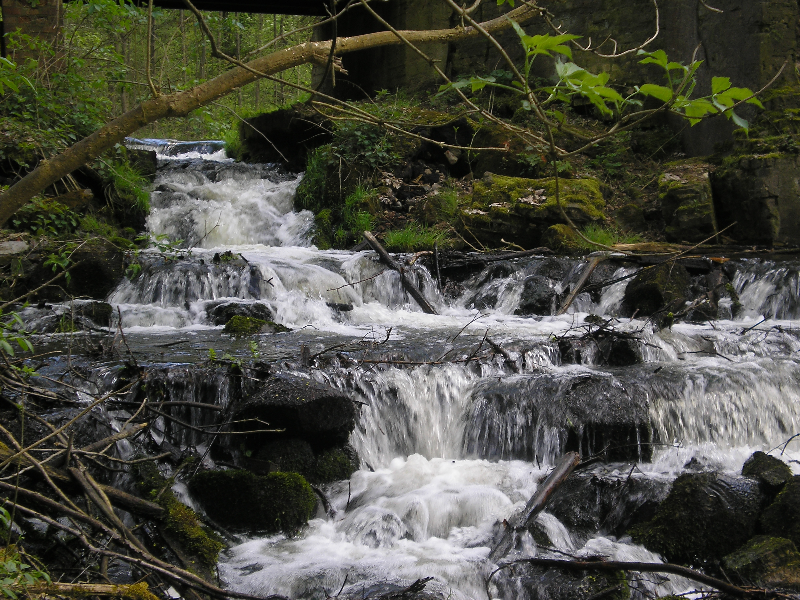 Plisz ka - Wodospad w Zamęcie